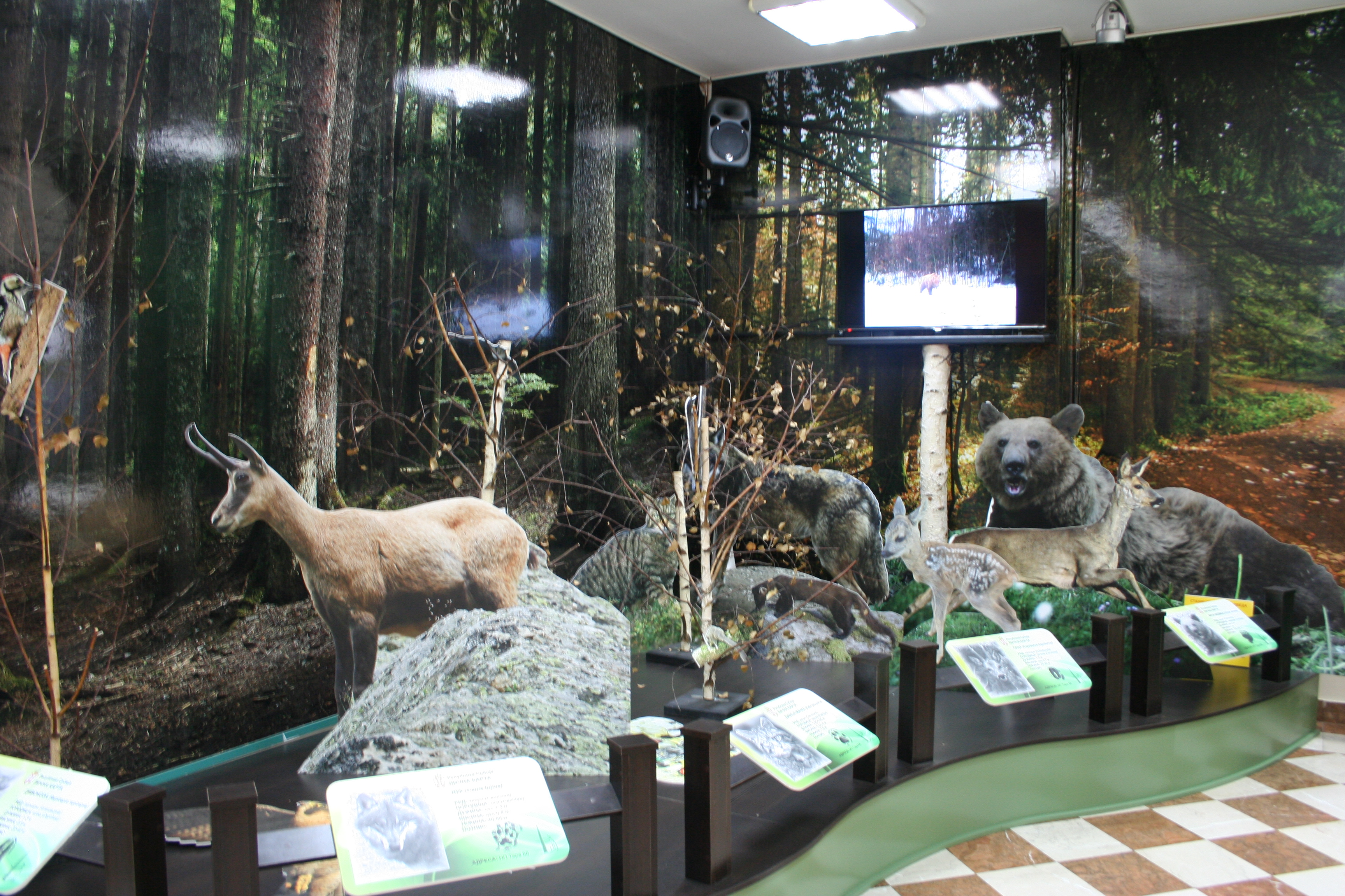 Centar za posetioce NP Tara, Bajina Bašta